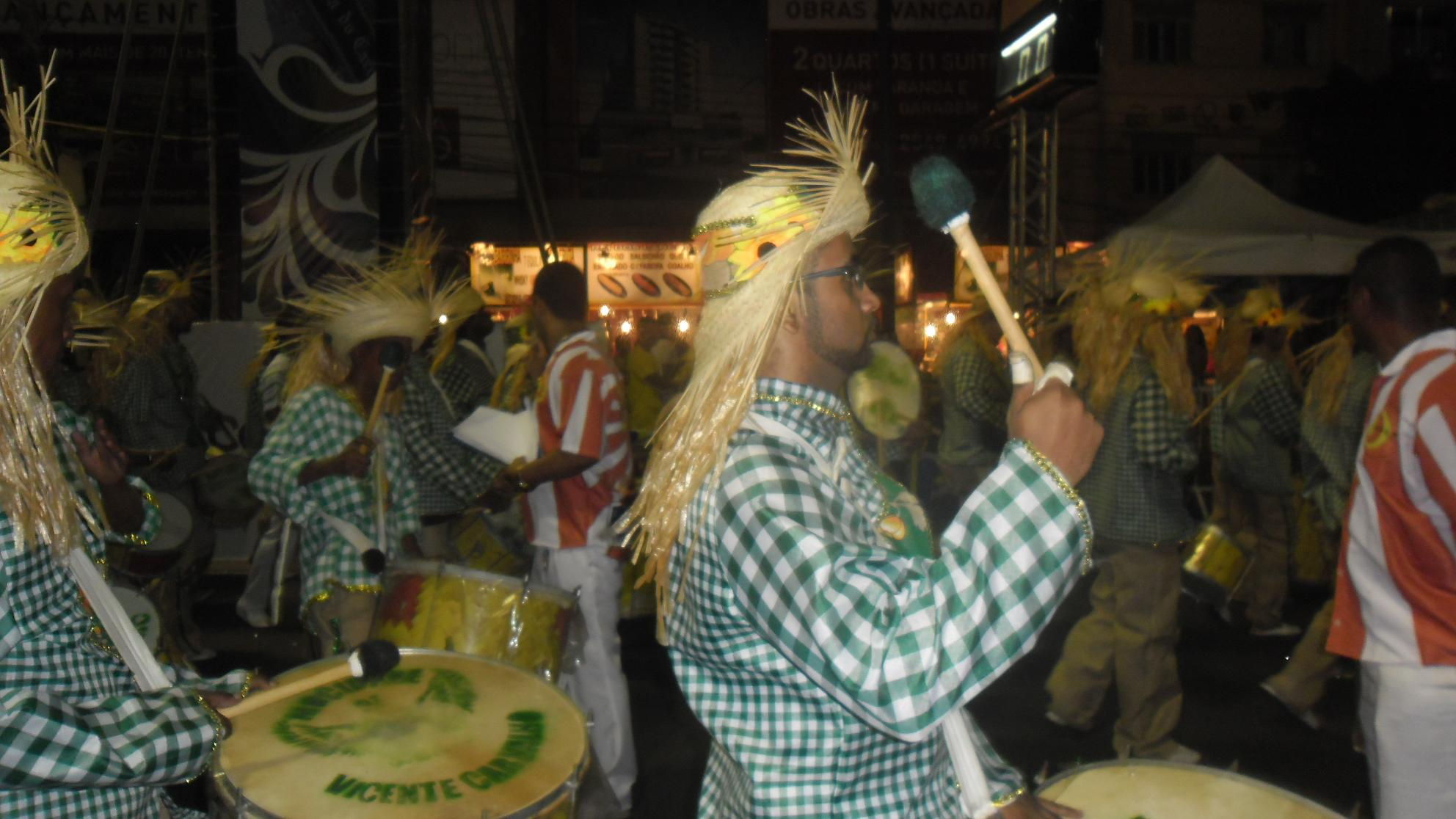 GRES Mocidade de Vicente de Carvalho